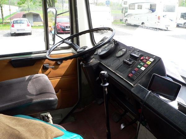 Кабина автомобиля Magirus-Deutz